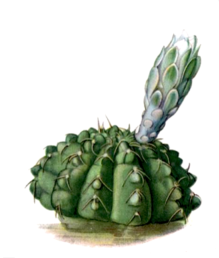 Gymnocalycium leptanthum